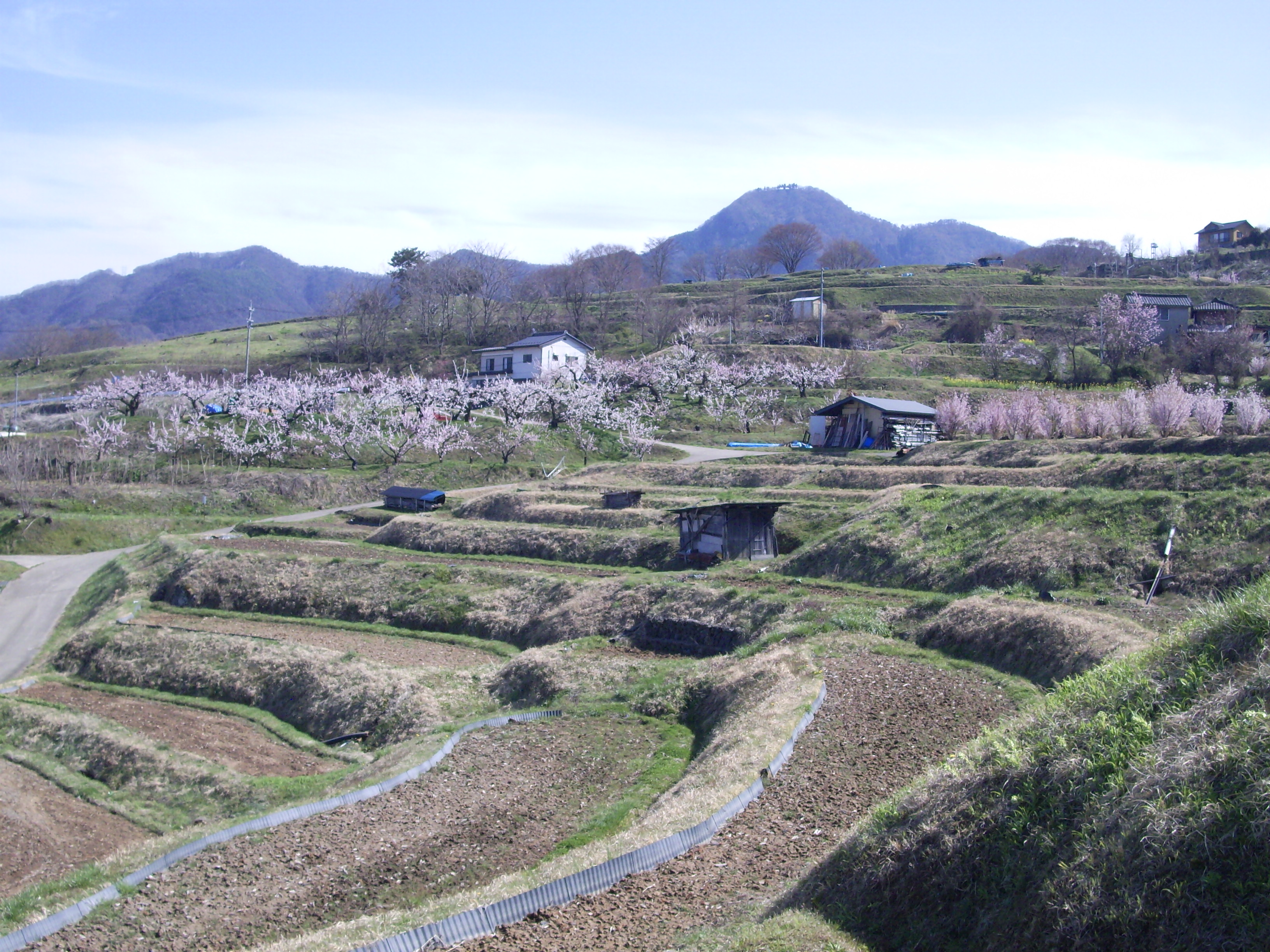 重要文化的景観「姨捨の棚田」ー引水前の状態